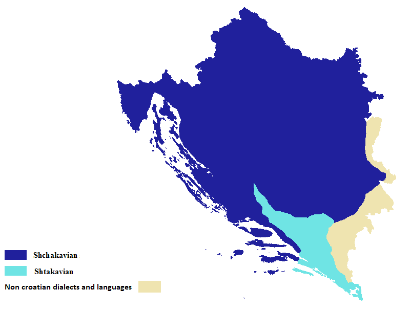 Srednjovjekovna štokavsko-šćakavska isoglosa. Štakavski su bili govori Hercegovine (i krajnjeg istoga dalm. Zagore) te dubrovačko primorje (i Boka). Ostatak je bio šćakavski